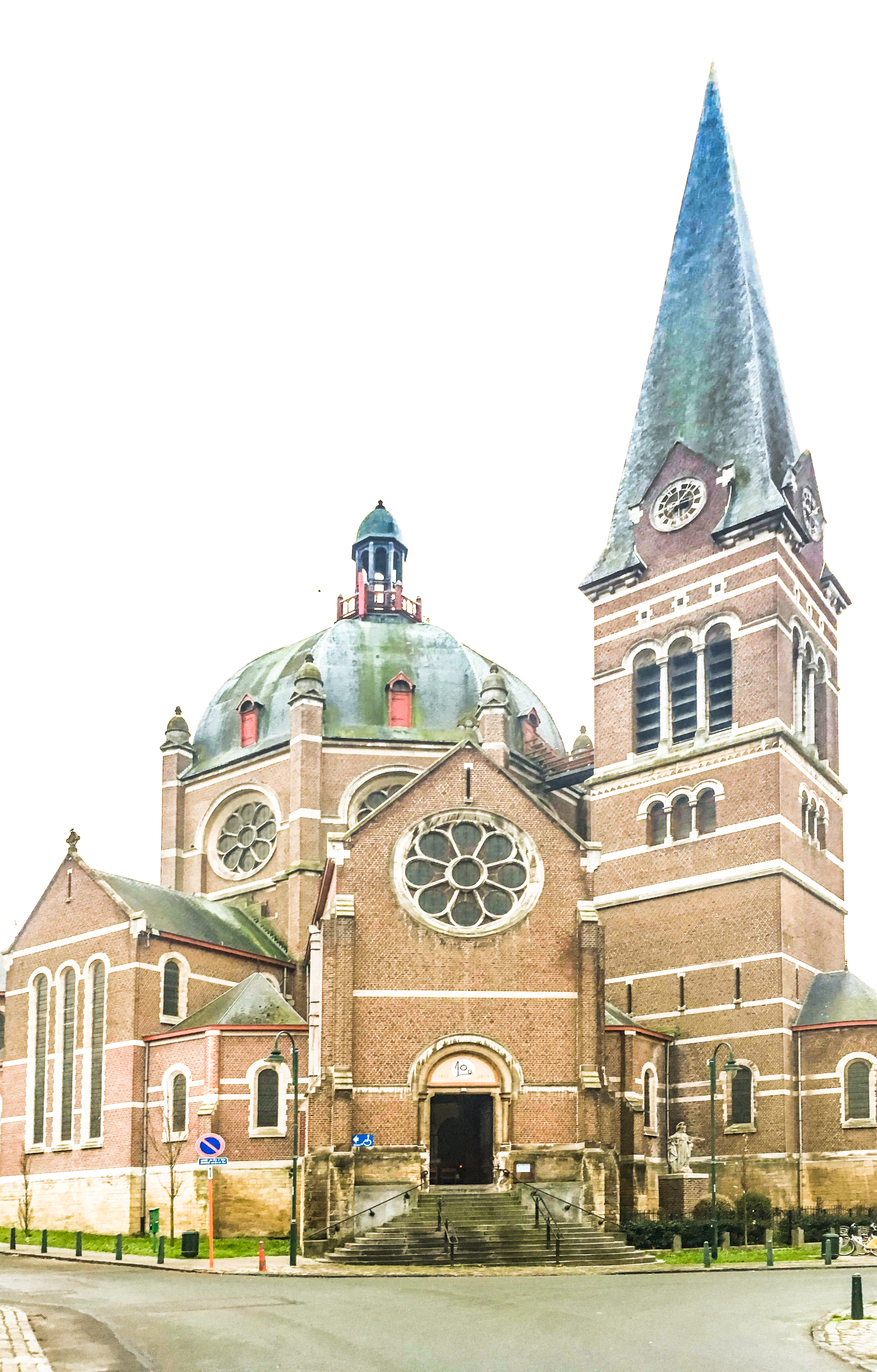 Eglise Saint-Job d'Uccle